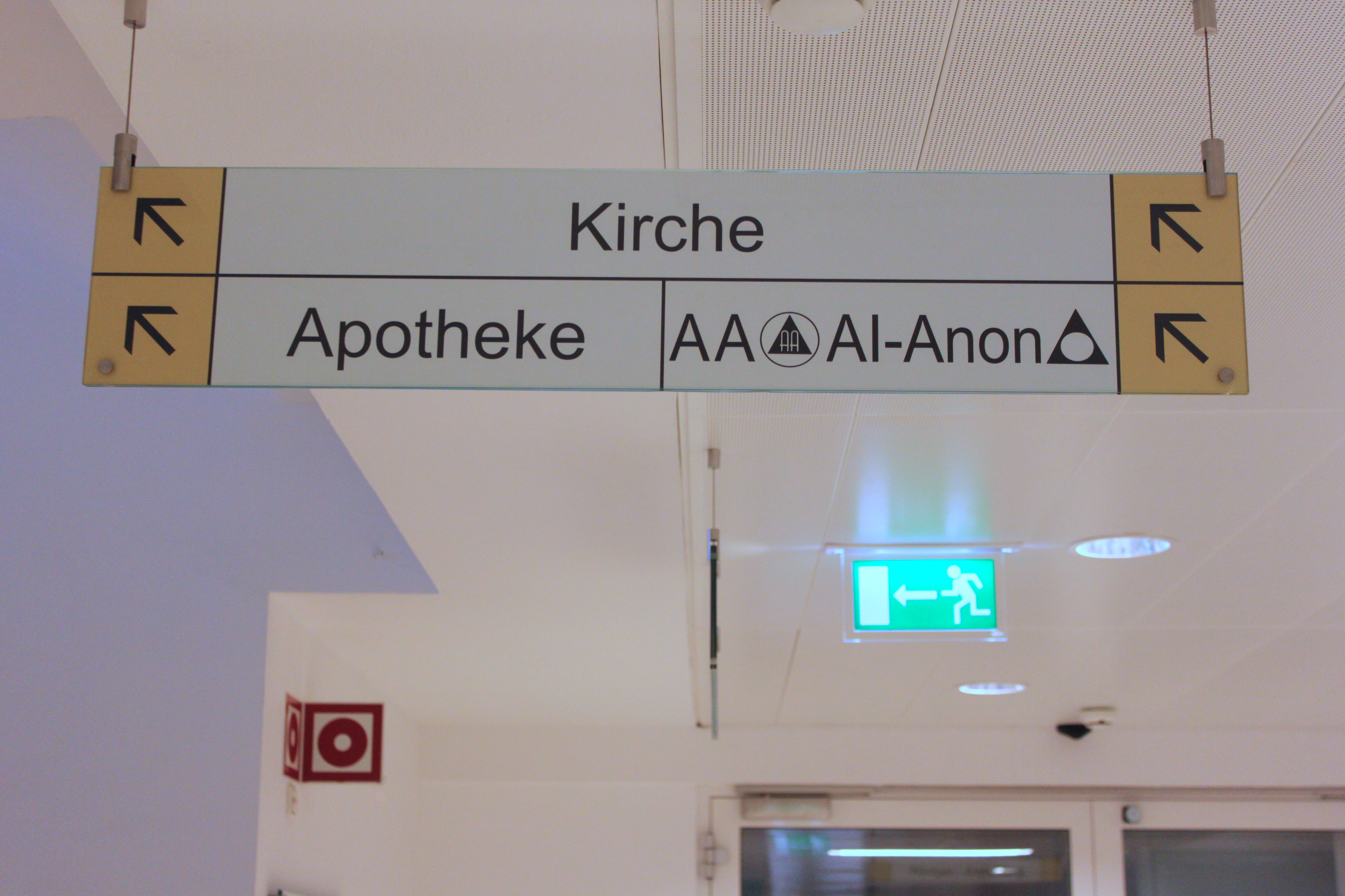 Deckenhinweis, Überkopfhinweis, im Krankenhaus der Barmherzigen Brüder in Linz, zum Gesprächsraum der Selbsthilfegruppen